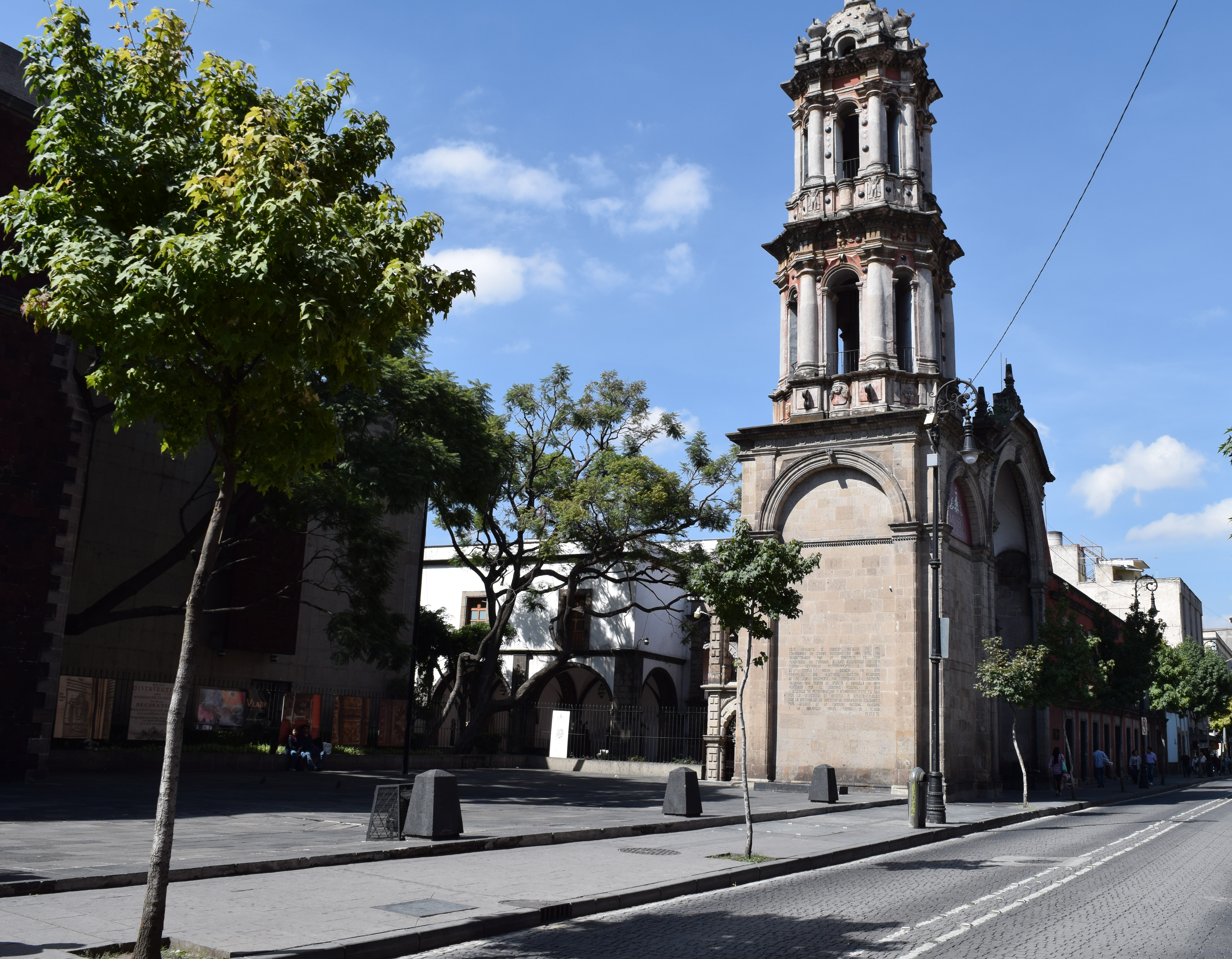 Antiguo Templo de San Felipe Neri El Viejo ubicado en el Centro Histórico de la Ciudad de México